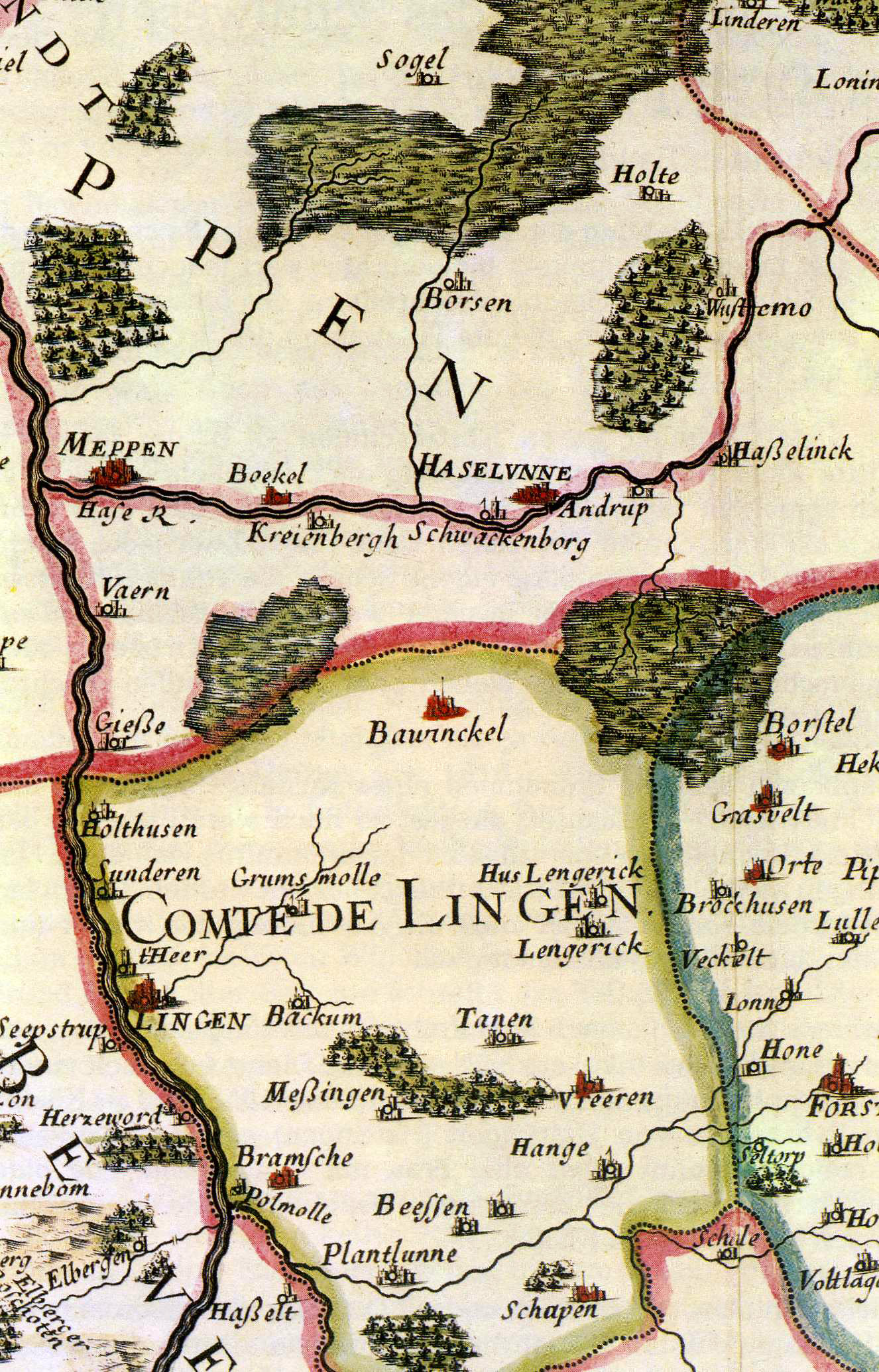 Bawinkel um 1673. Kartenausschnitt „Basse Partie de Levessché de Munster“